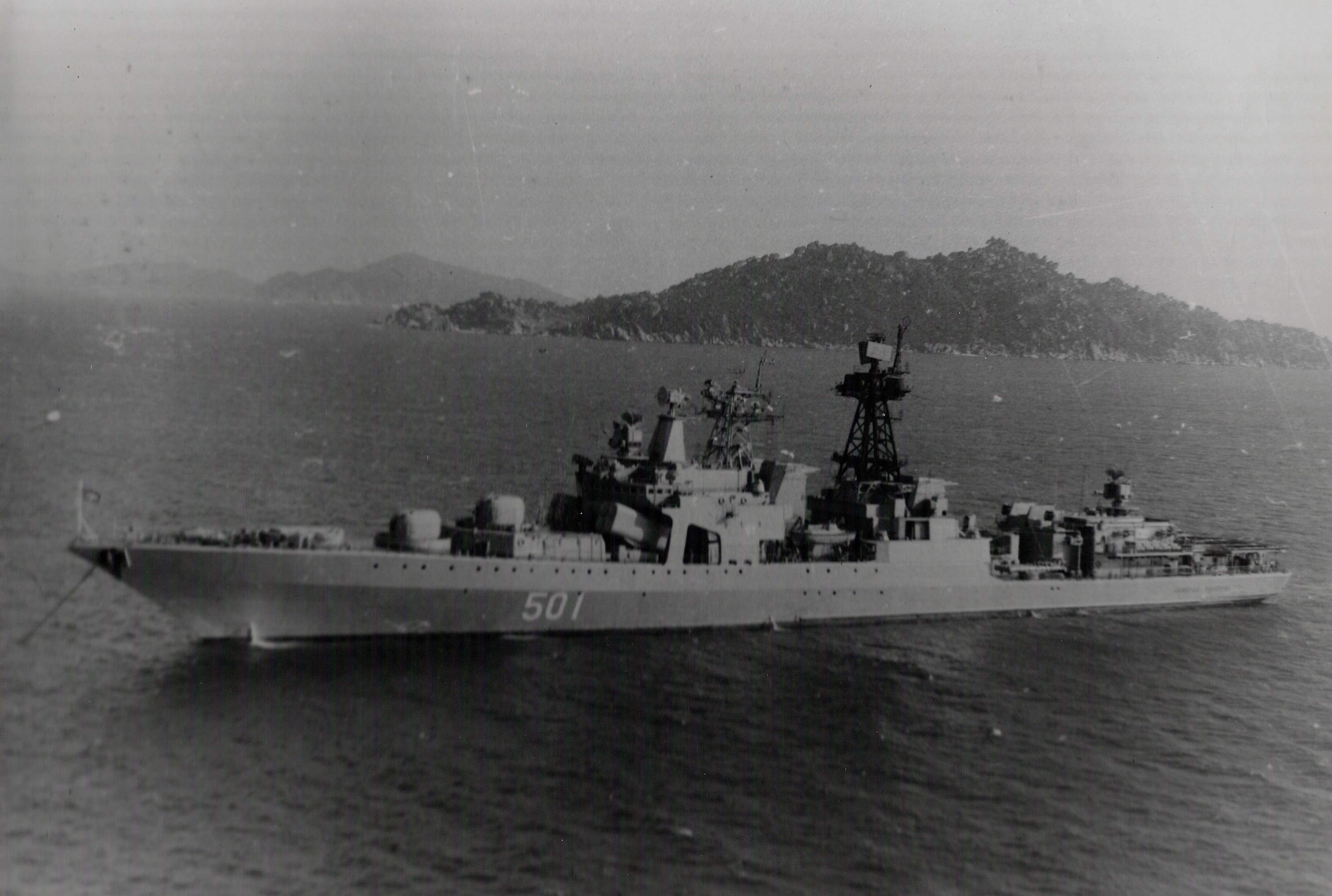 БПК "Адмирал Захаров" в бухте Камрань, 1991год